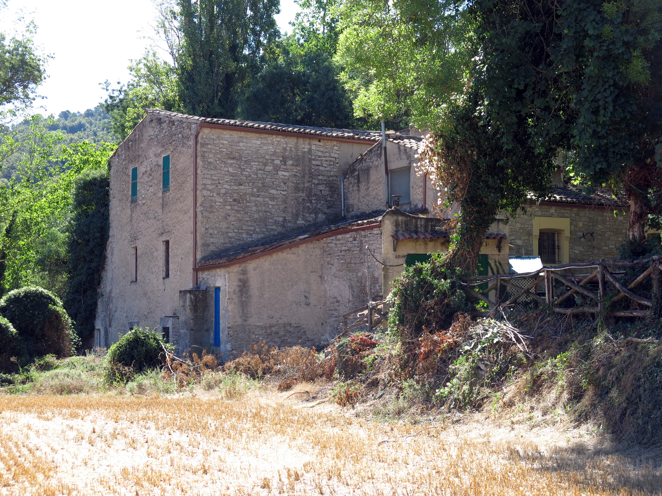 Molí de la Cadena de Baix (Vallfogona de Riucorb)